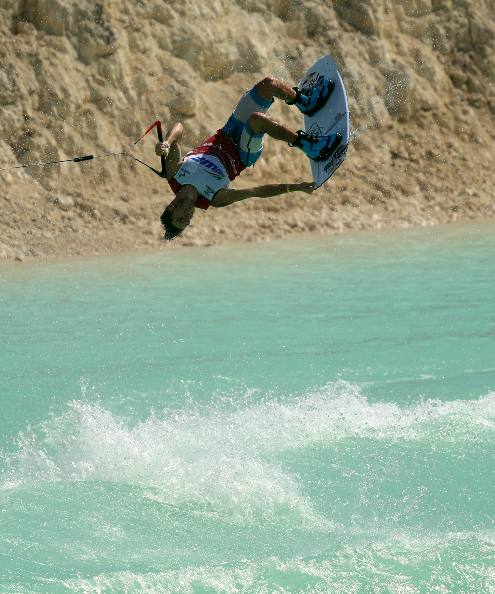 Il Campione del Mondo Open Man 2015 Massi Piffaretti